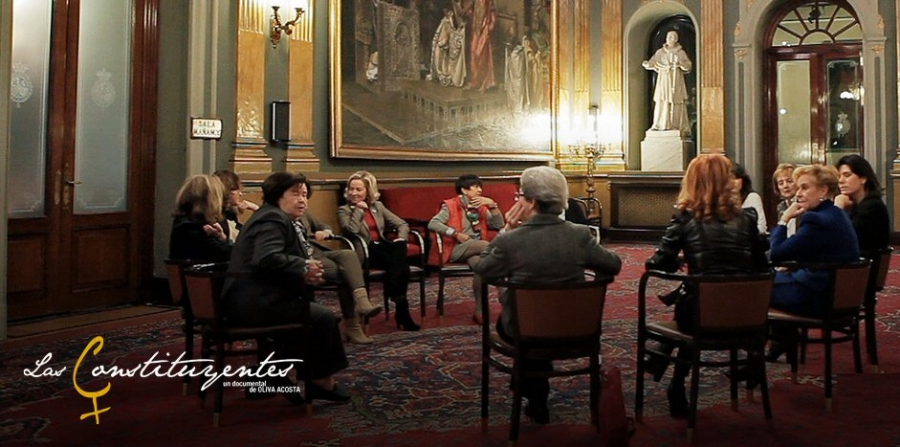 Escena del Largometraje documental "LasConstituyentes" de Oliva Acosta, rodada en el Senado Español. Fotograma del documental #lasconstituyentes (2011) de Oliva Acosta. Las Constituyentes es un documental dirigido en 2011 por Oliva Acosta sobre las 27 mujeres, diputadas y senadoras que participaron en la Legislatura Constituyente. Un documento que recupera la voz de las primeras mujeres que accedieron al Parlamento tras la dictadura de Francisco Franco y que recoge la historia y la participación política de las mujeres en España1 . El documental está subtitulado en español, inglés y francés. Photo from the documentary film #lasconstituyentes (2011) directed by Oliva Acosta